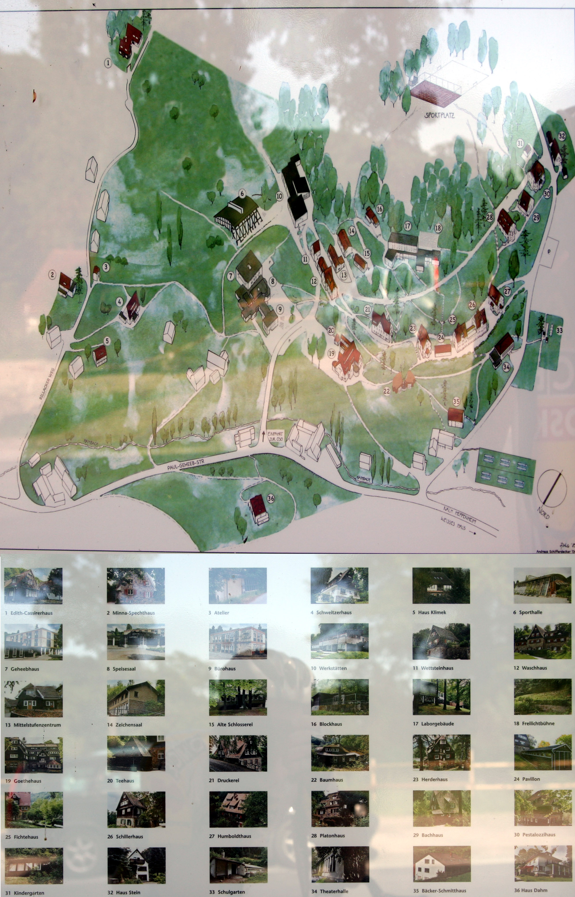 Schautafel mit Lageplan der Odenwaldschule in Heppenheim, Ortsteil Ober-Hambach. Aus zwei Einzelaufnahmen zusammengesetzt.